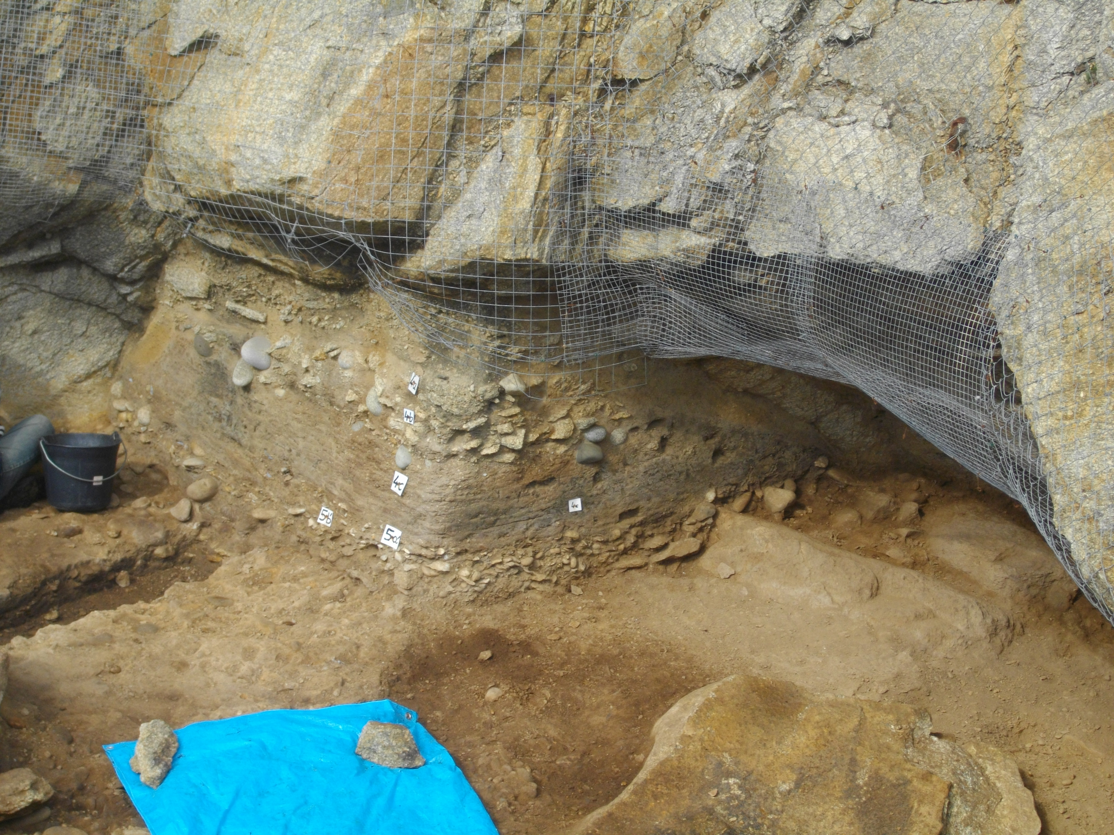 Gisement de Menez Dregan ( commune de Plouhinec dans le Finistère)Ancienne grotte marine préhistorique